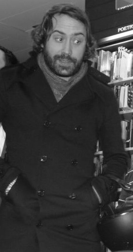 Anthony-Cédric Vuagniaux@biblio Genève